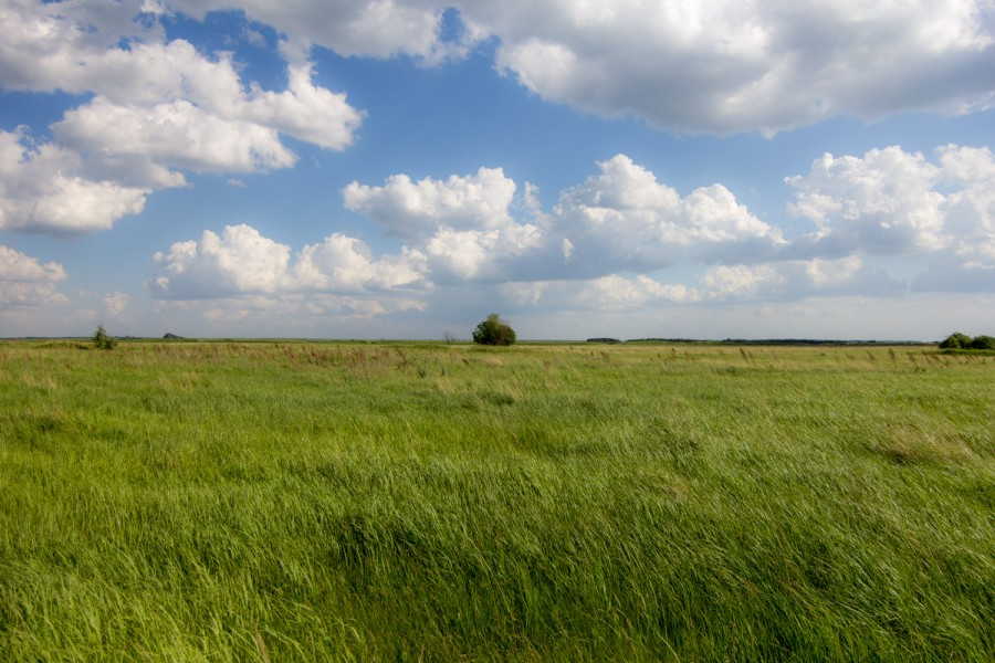 Билярский заказник: Аксубаевский район, Татарстан This image is related to the protected area of Russia number 1610011